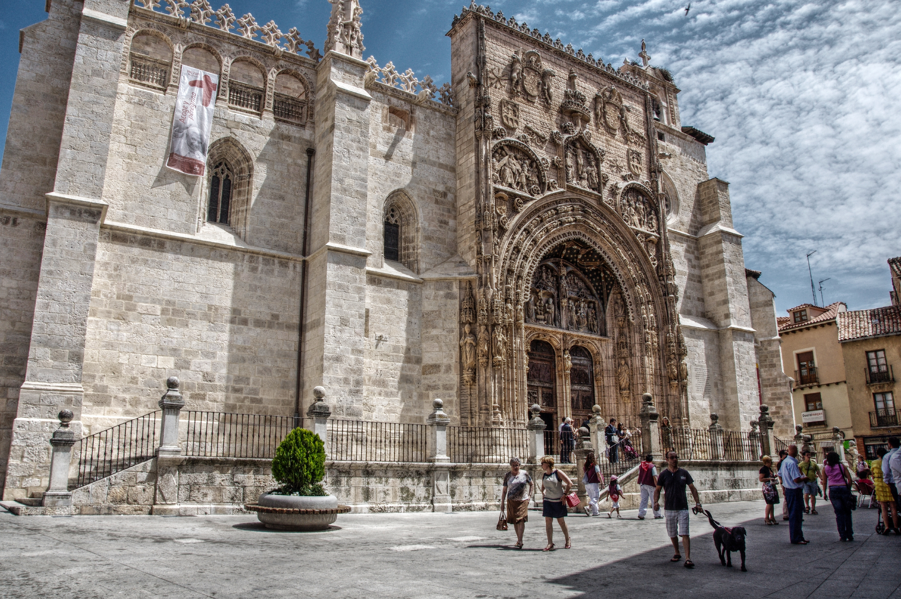 Iglesia de Santa María rq